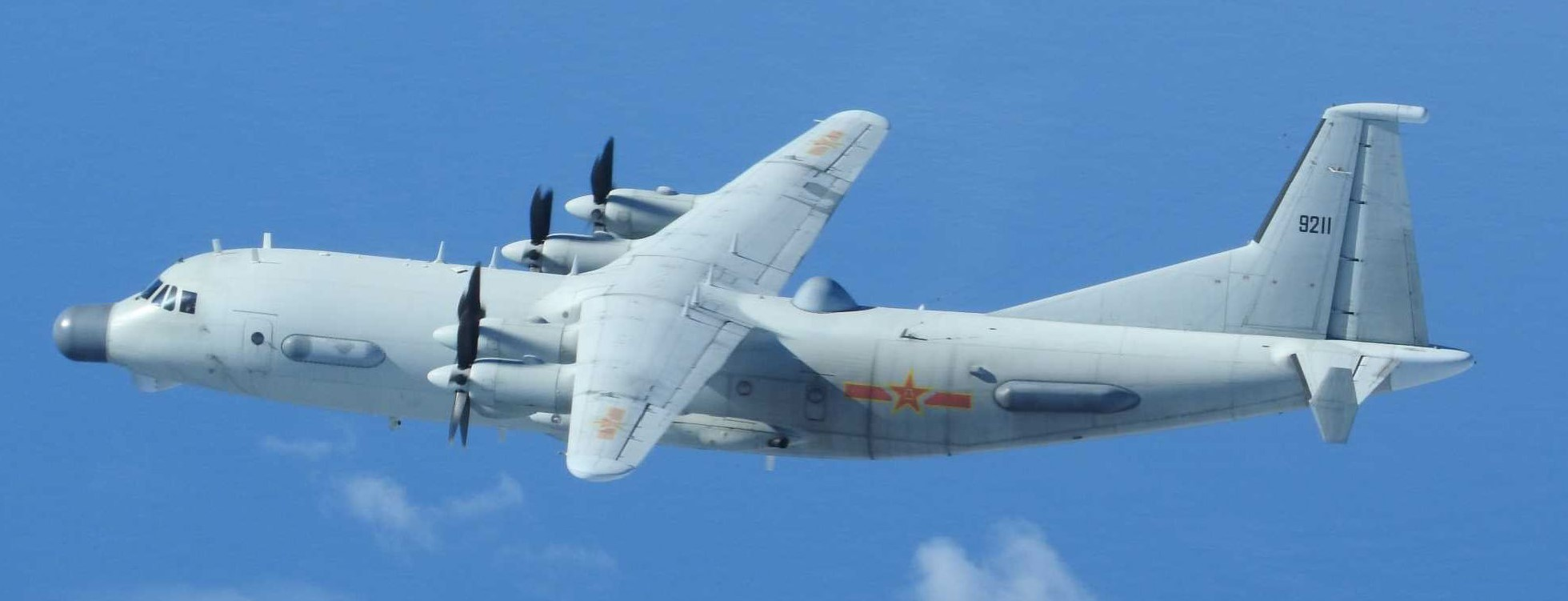 中文（台灣）: 中國解放軍空軍高新8號